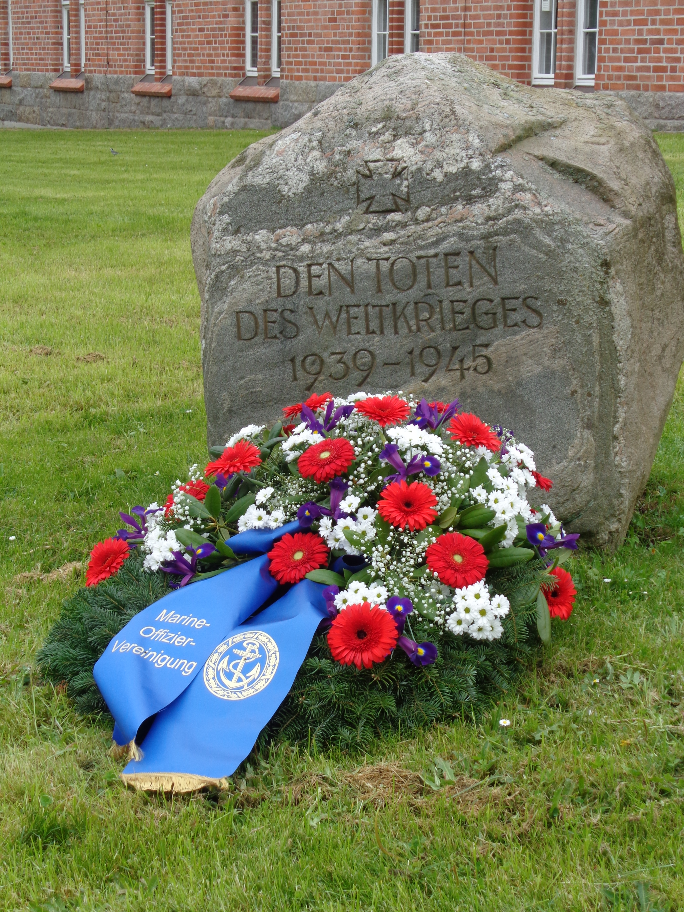 Kranz der Marine-Offizier-Vereinigung am Gedenkstein für die Gefallenen des Zweiten Weltkrieges